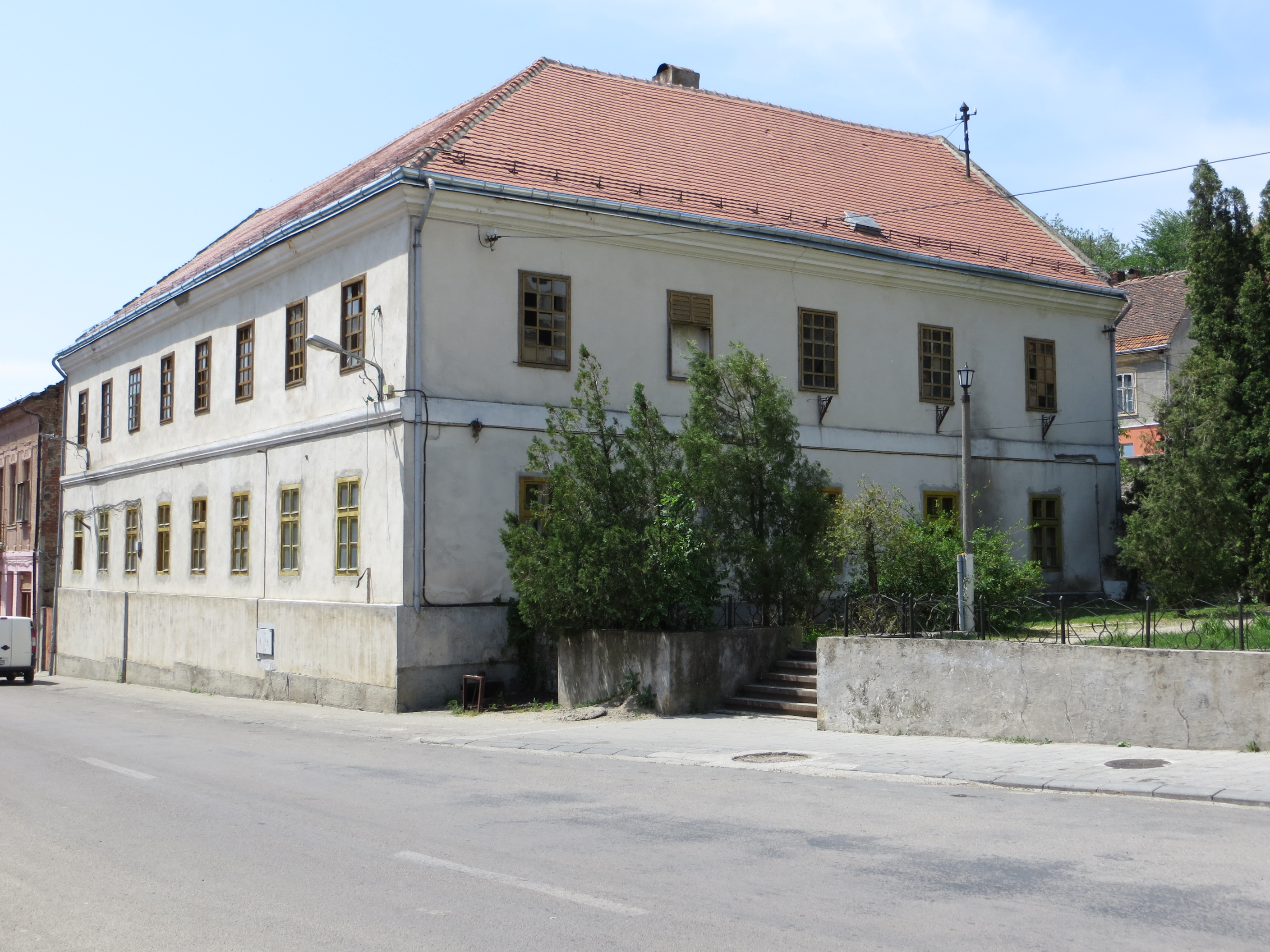 Școala Militară (ulterior, sediu al Districtului Montanistic), azi Casă parohială romano- catolică